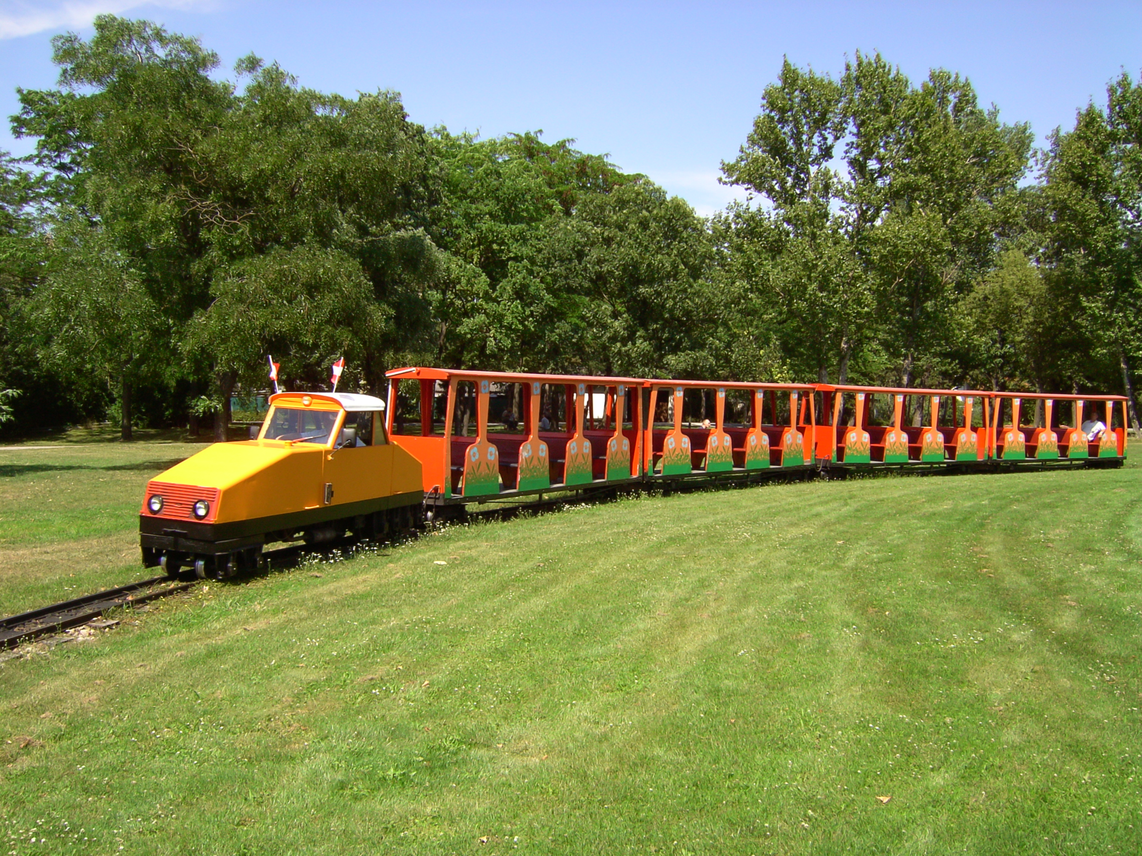 Donauparkbahn - Lok D2 mit 4-Wagen Zug.